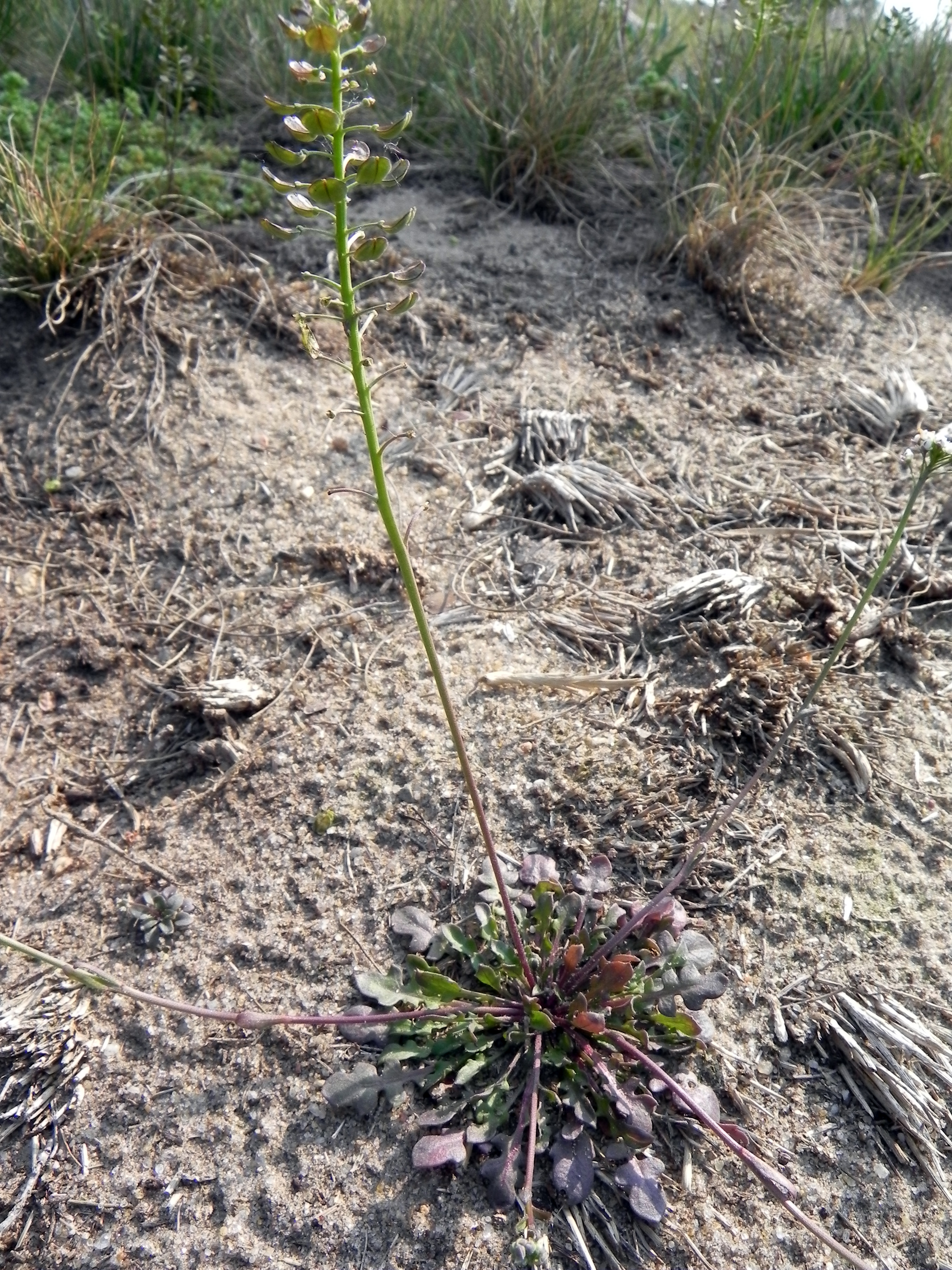 Bauernsenf (Teesdalia) im Naturpark Südheide, Niedersachsen, Germany